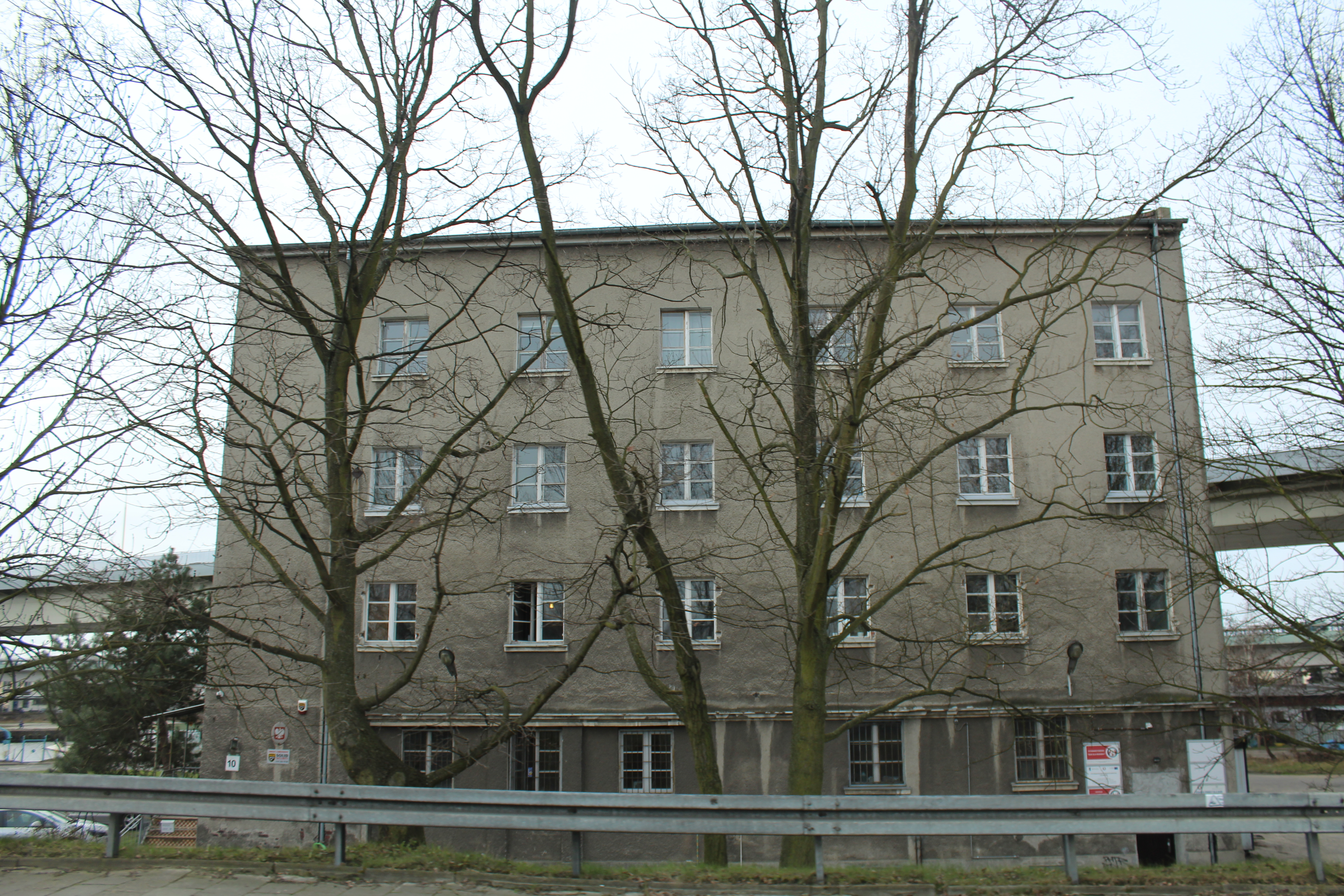 Komisariat Portowy, ul.Energetyków, Szczecin